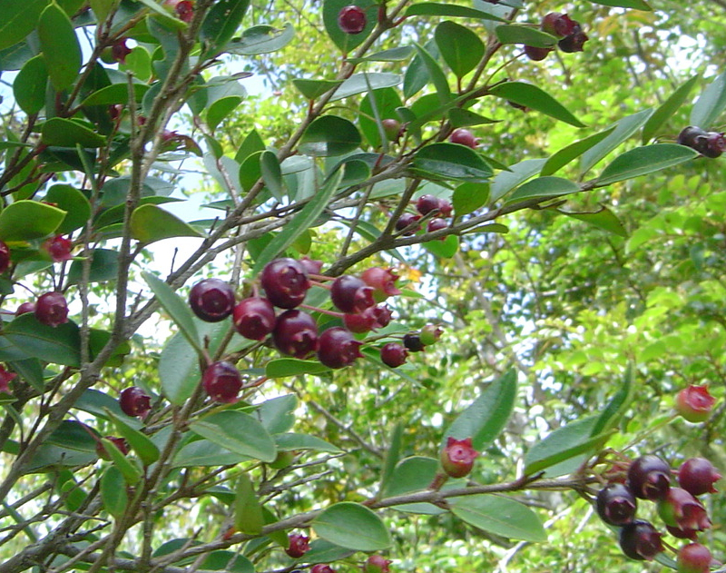 Rama de luma (Amomyrtus luma) con cauchaos a punto de madurar. Quinched, Chonchi, Chile